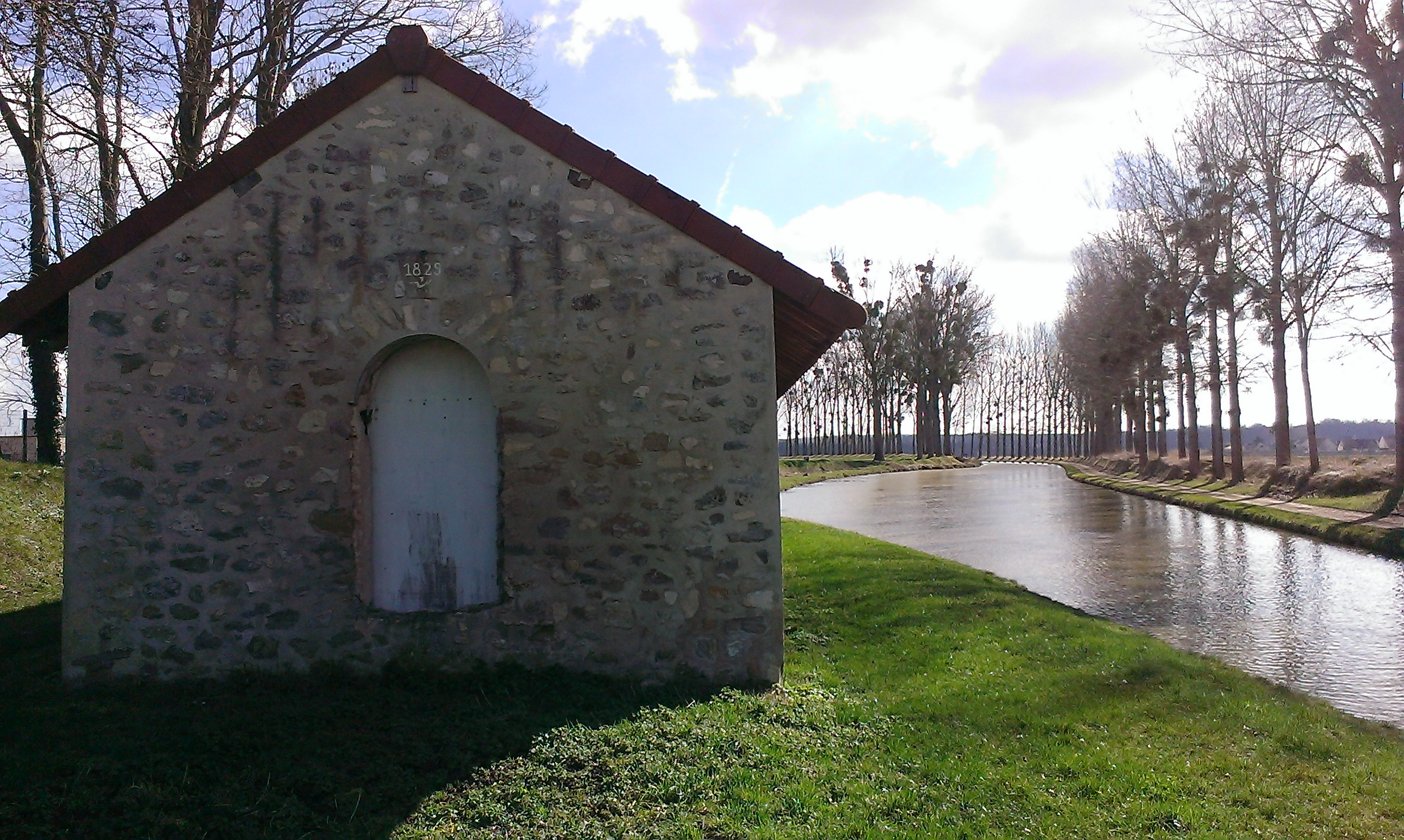 Gare du canal de l'Ourcq, à Varredes (Seine-et-Marne)